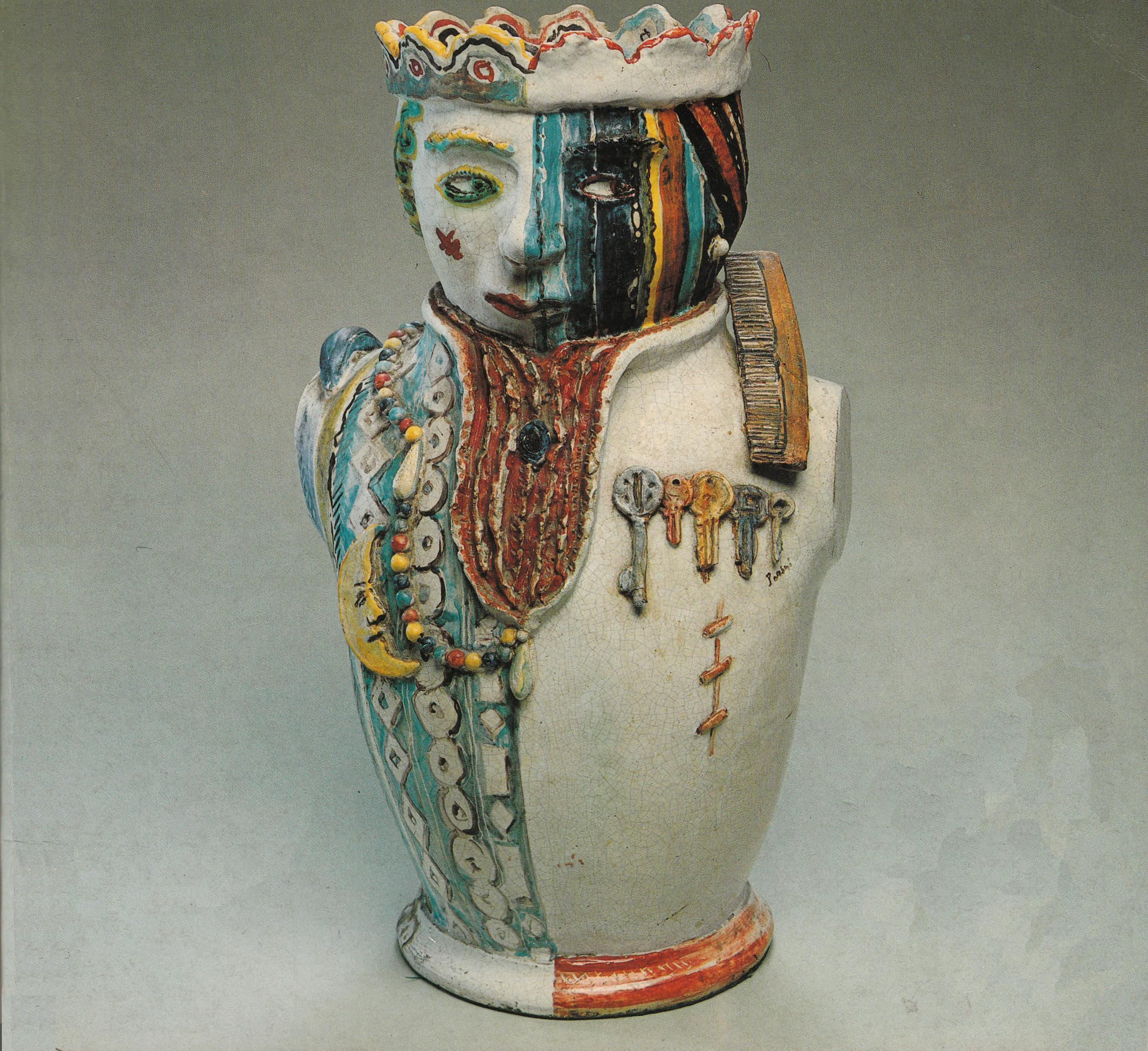 Grande vaso antropomorfo in maiolica. Decorazione policroma con applicazioni a rilievo, cm 65,35,28. Per gentile concessione del Comune di Nove, 11/03/2013, Prot. n. 0002470, foto tratta dal volume "Andrea Parini - Ceramiche 1935 - 1970", 1983, Neri Pozza Editore